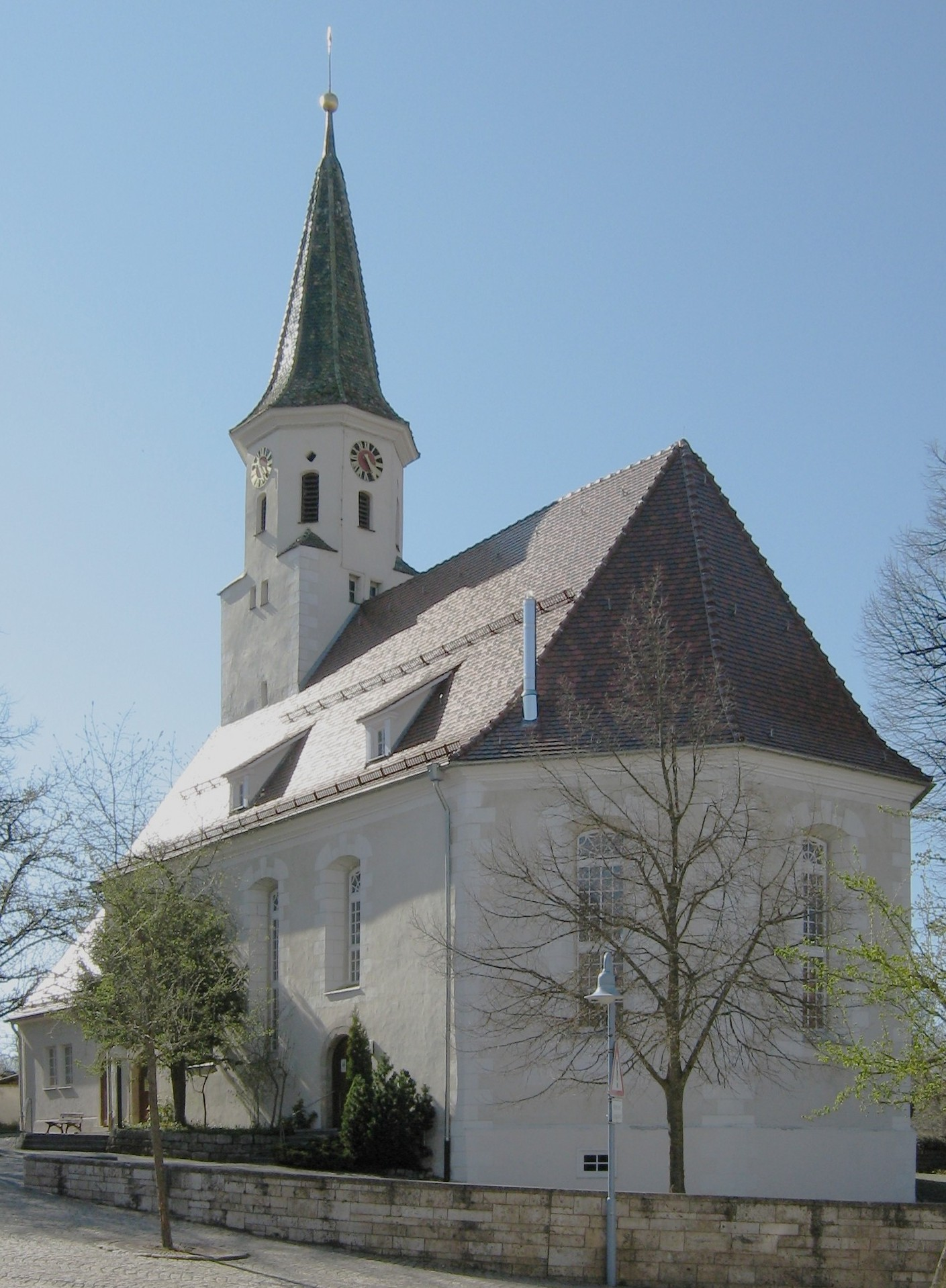 Sankt Blasiuskirche in Engstingen-Kleinengstingen, Germany